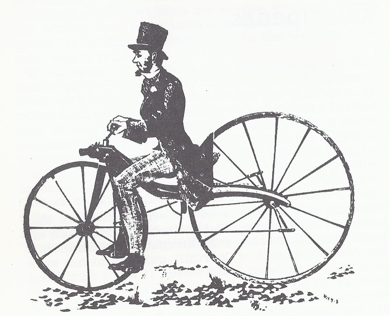 Kirkpatrick Macmillan und sein Velocipede (1839)